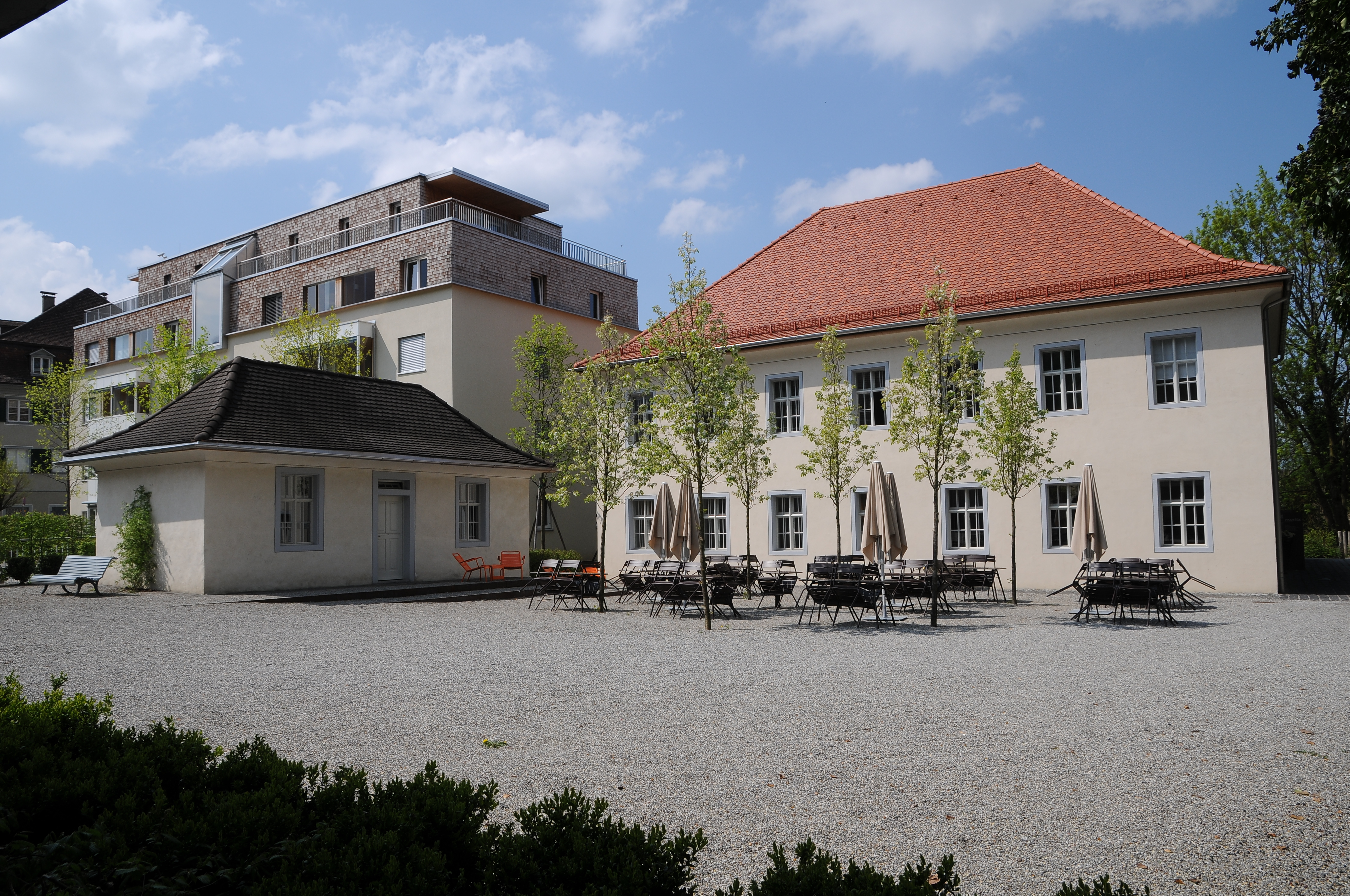 Schulgasse Nr.1 (ehemals Schule) in Hohenems; Info Das Objekt steht unter Denkmalschutz.